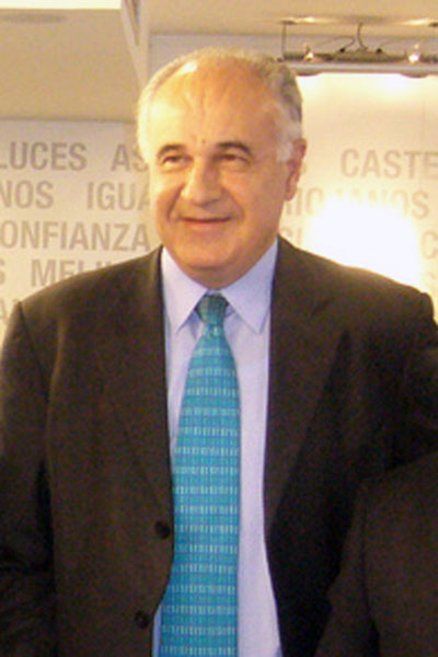 Rafael Blasco Castany, polític valencià